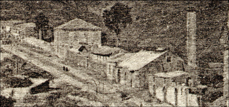 Gasometro a Caltanissetta nell'800